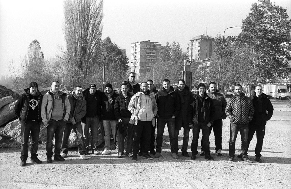 BS u Kosovskoj Mitrovici